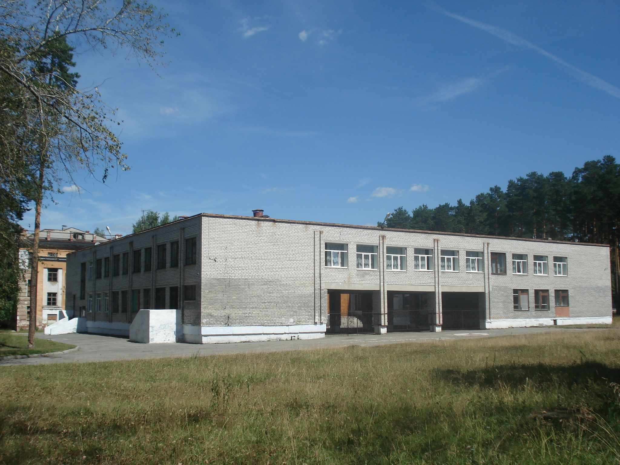 Пристрой СОШ №24, поселок Кедровое, 1993 год